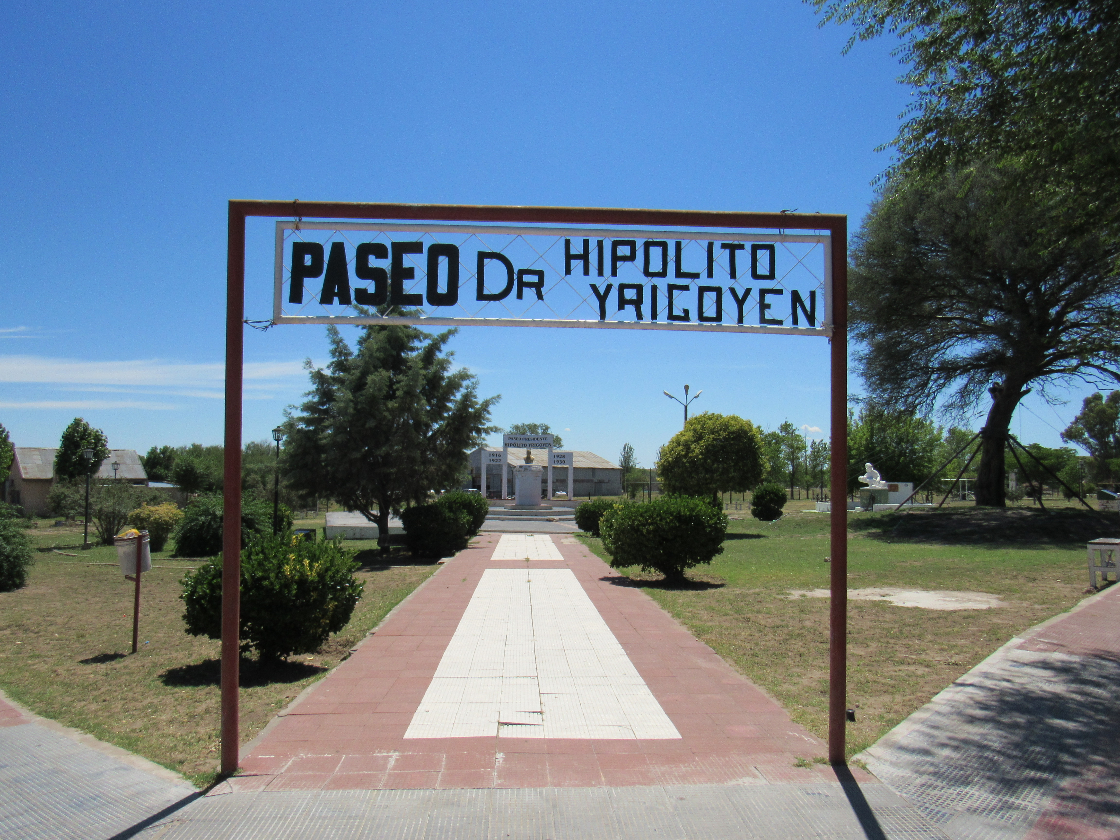 Ingreso al Paseo Dr Hipólito Yrigoyen en General Acha, La Pampa